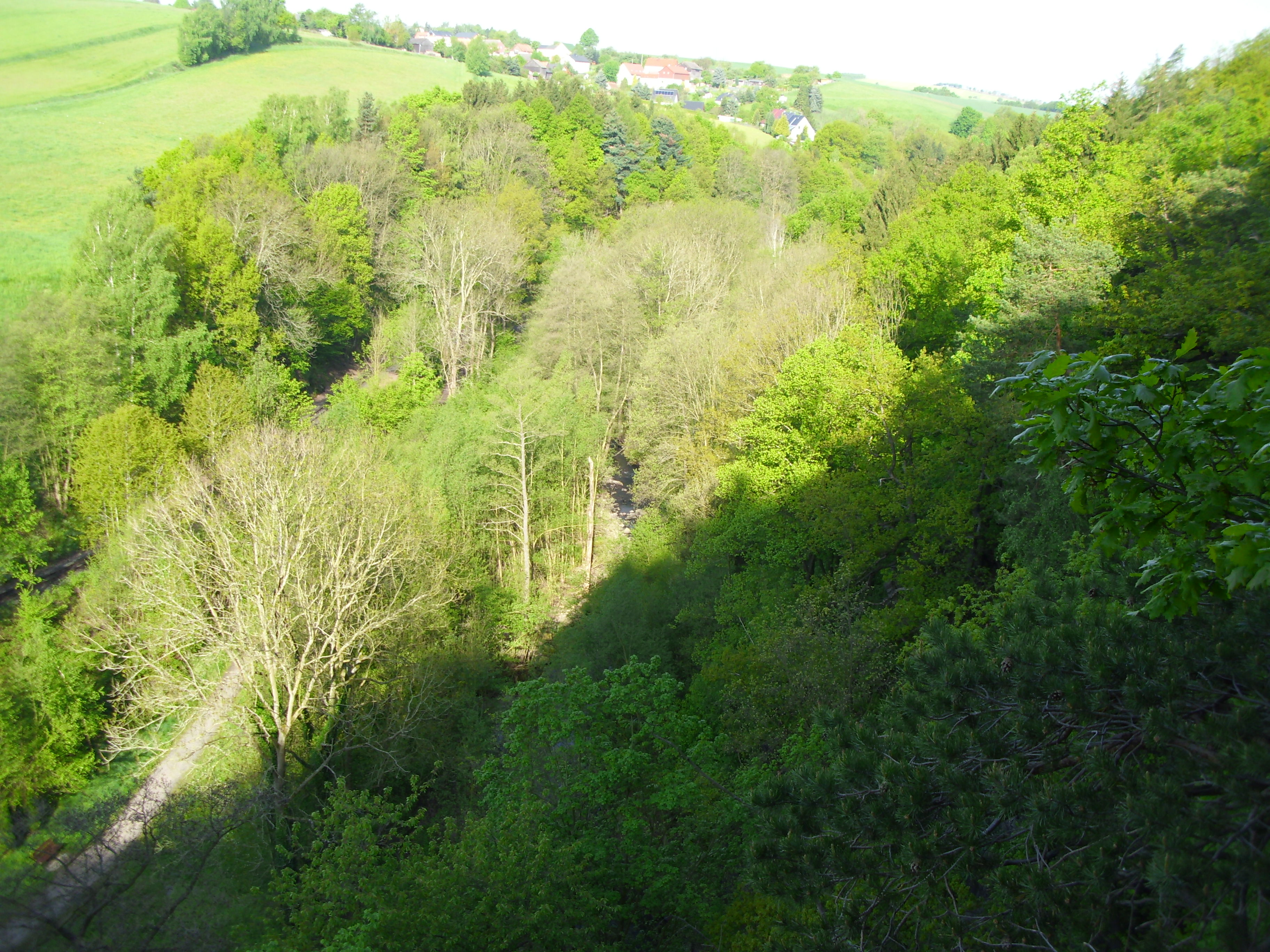 Ein Blick von den Felsen zwischen Spechtritz und Seifersdorf, auf den Spechtritzgrund mit der Ortschaft Spechtritz